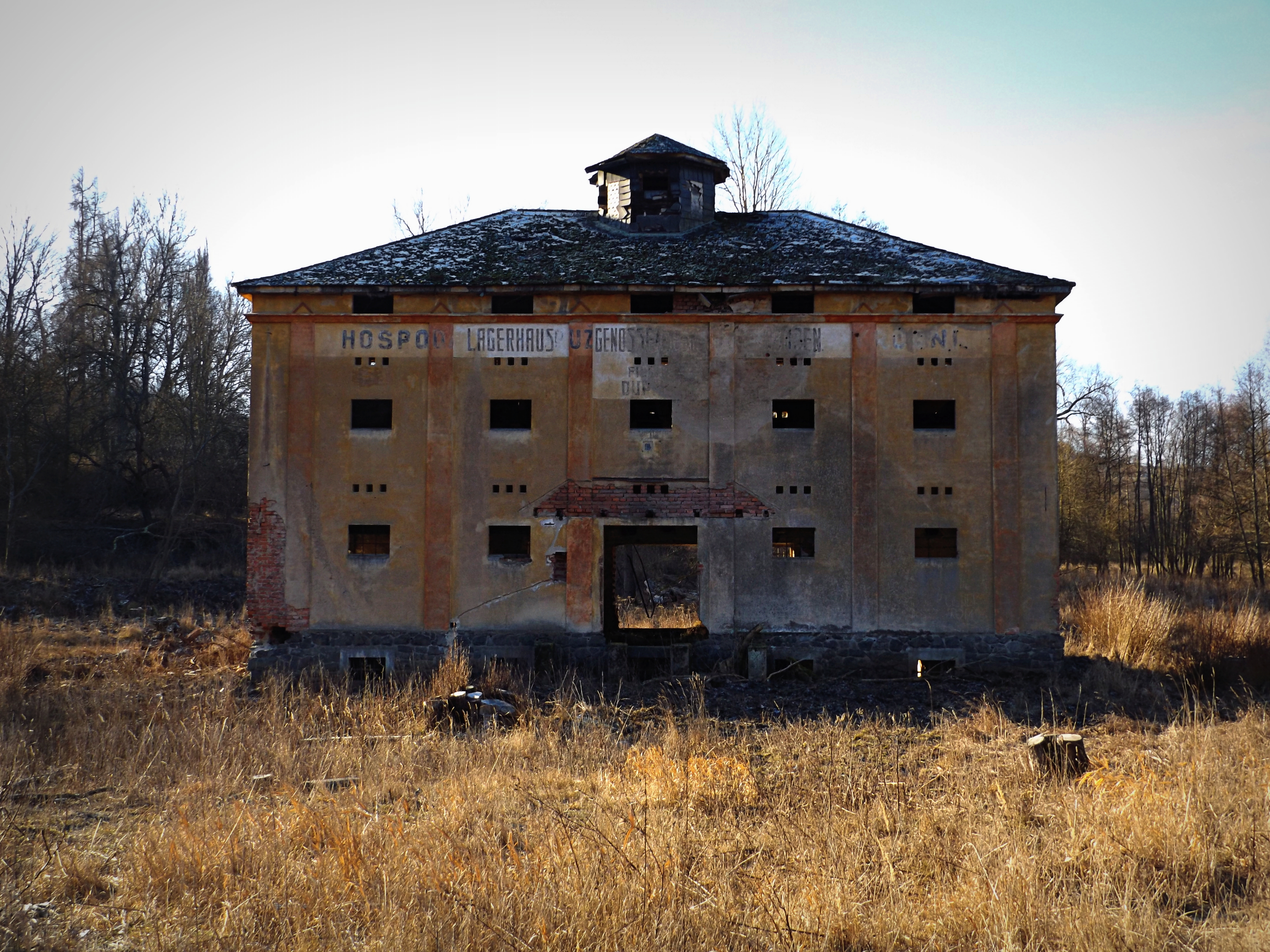 Budova nádražního skaldu v bývalém Doupově.